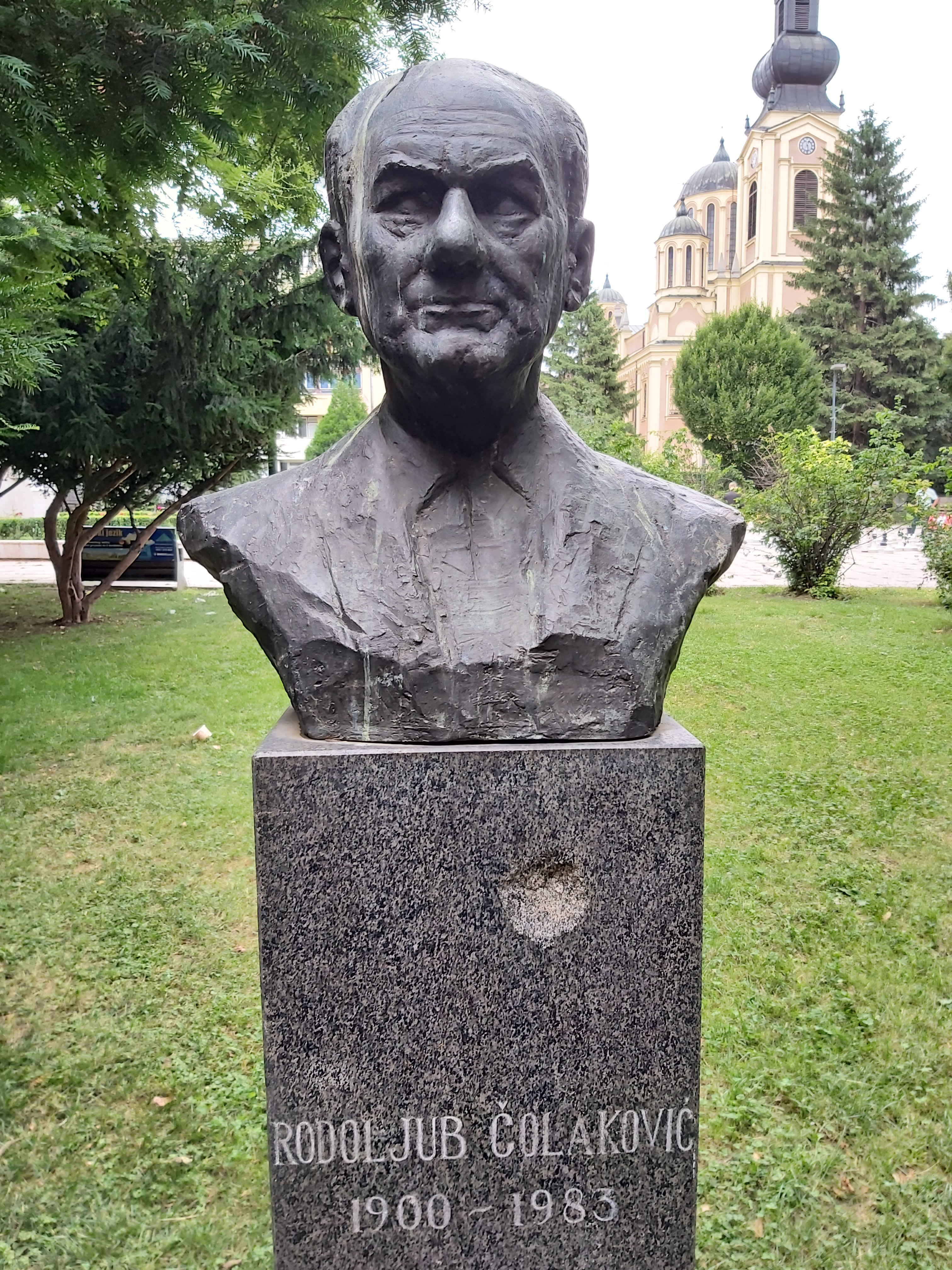 Rodoljub Čolaković, bista, Trg Oslobođenja - Alija Izetbegović, Sarajevo